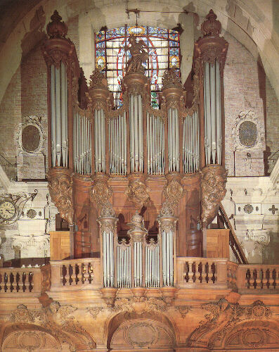 Dans l'église Notre-Dame-des-Victoires, buffet par le maître menuisier parisien Louis Régnier en 1739 pour l'orgue de François-Henri Lesclop; seul le buffet est classé Monument Historique au titre objet depuis le 20-02-1905. Il contient maintenant un instrument d'Alfred Kern de 1973.